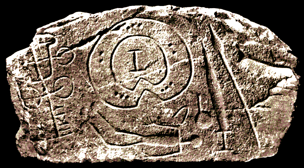 Estela Funeraria del Castro de Solana de Cabañas, en el partido judicial de Logrosán (provincia de Cáceres, España).